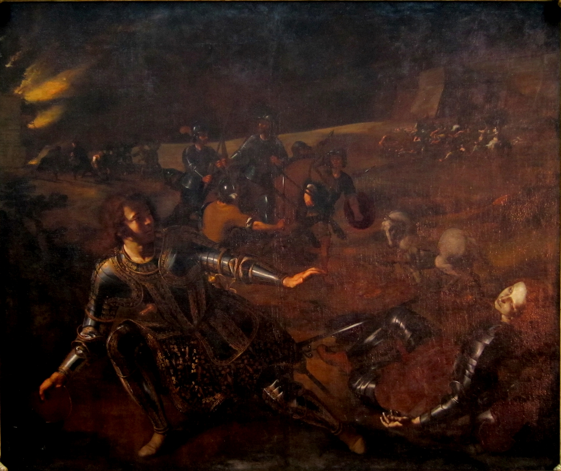 Jérusalem délivrée. Clorinde reçoit le Baptême de Tancrède (Palazzo Acquaviva, Conversano).